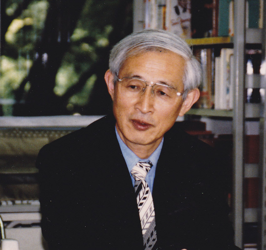 太田尚樹顔写真